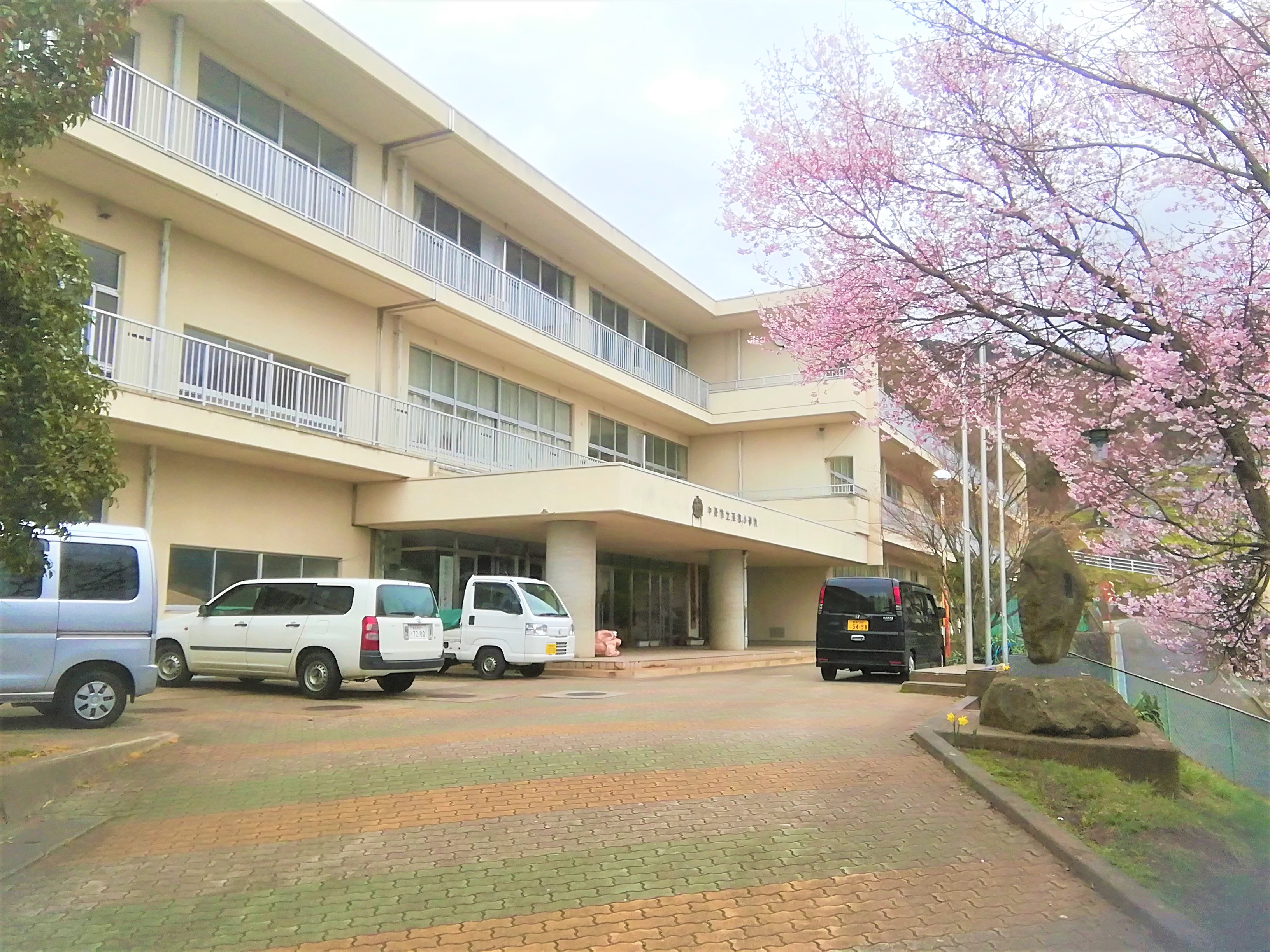 中野市立延徳小学校（2020-4-1）